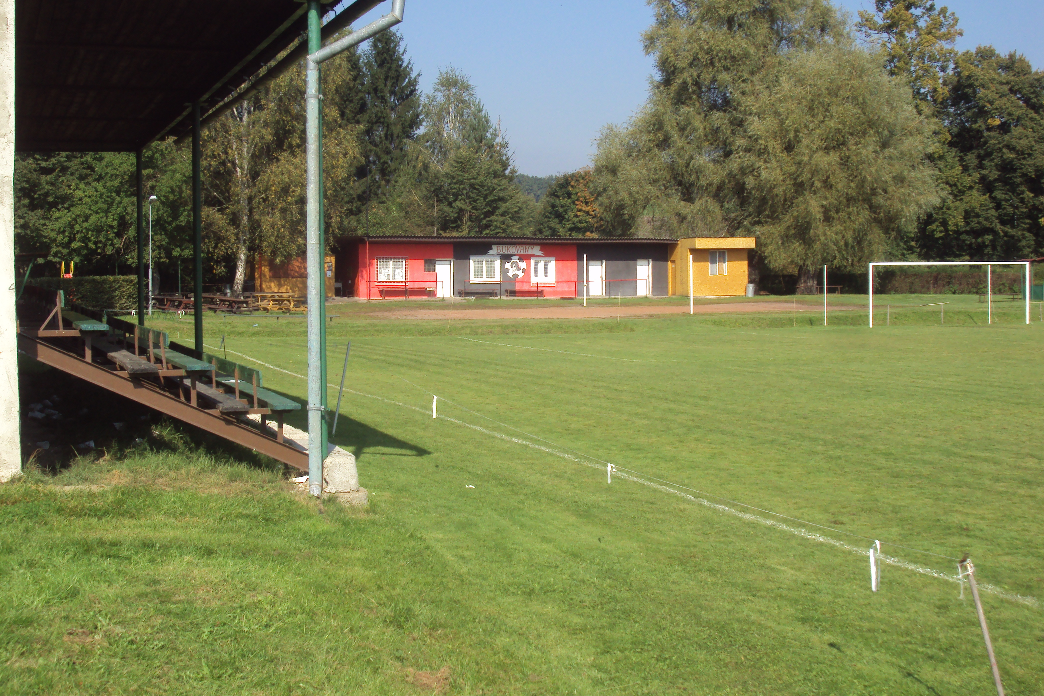 Kabiny fotbalistů obce Bukovany u Nového Boru